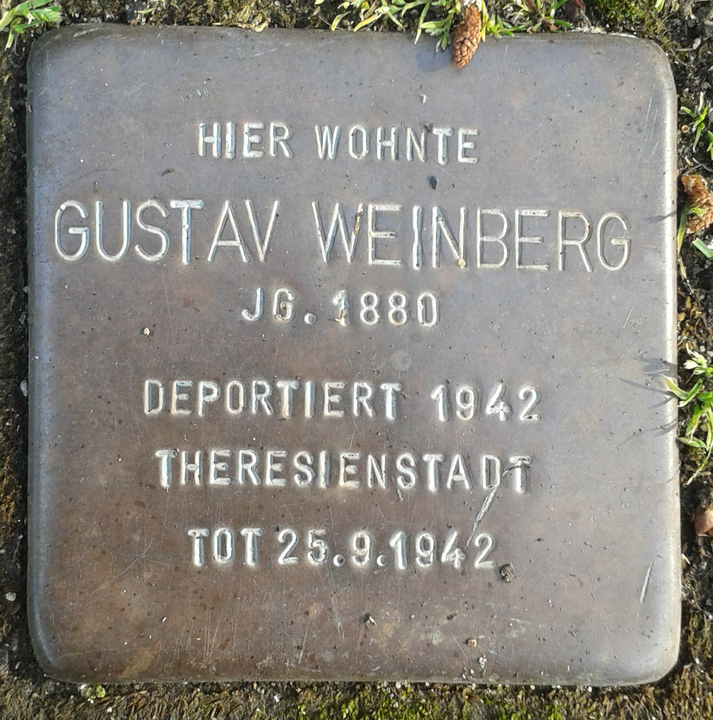 Stolperstein Selm Bahnhofstraße 37 Gustav Weinberg